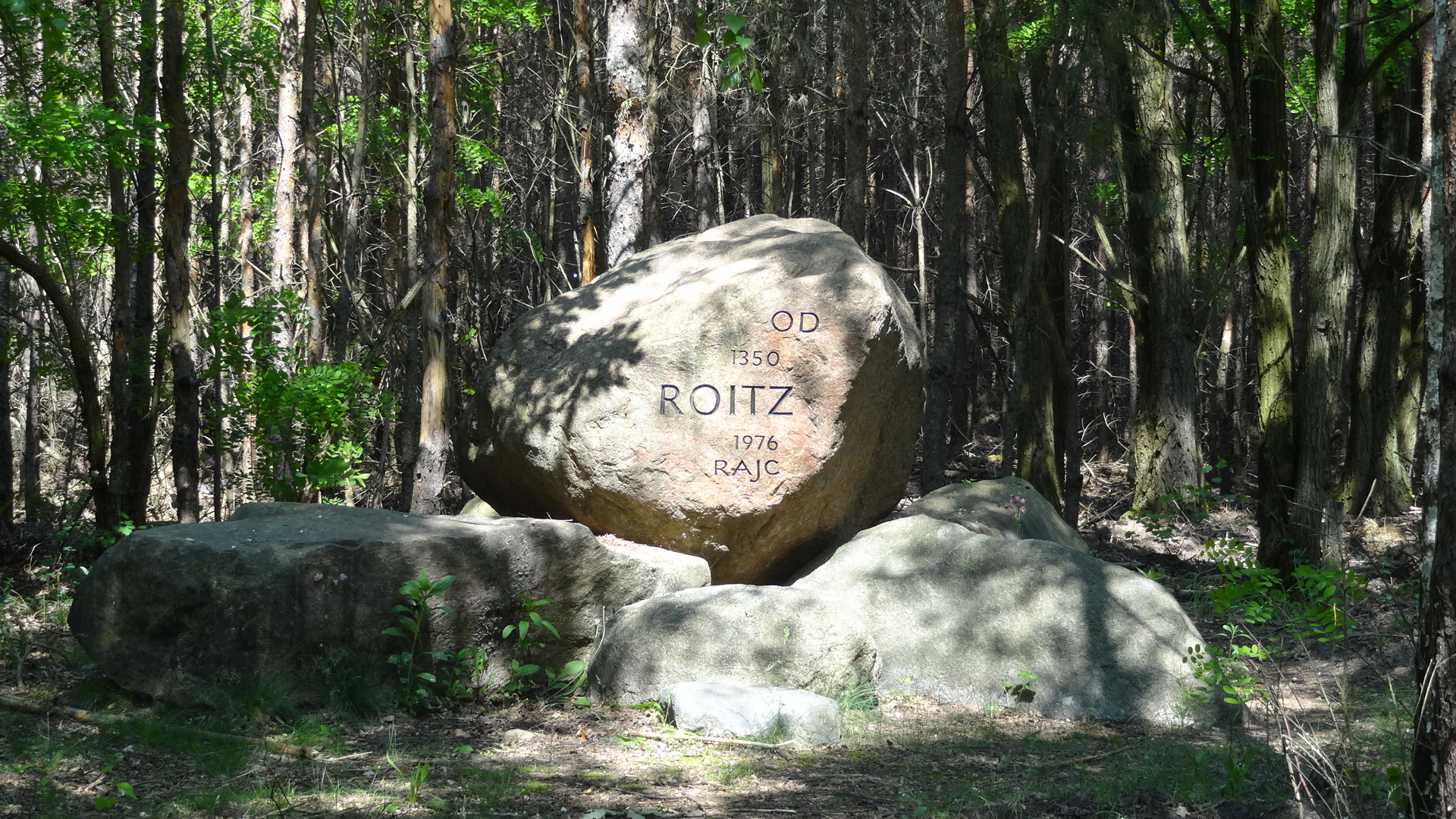 Gedenkstein für den Ort Roitz